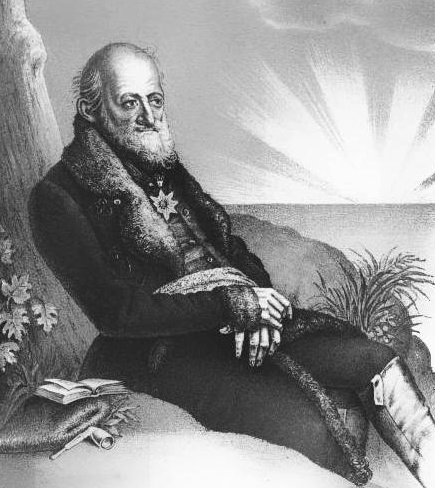 Theodor von Hallberg-Broich (1768-1862), deutscher Reisender und Schriftsteller